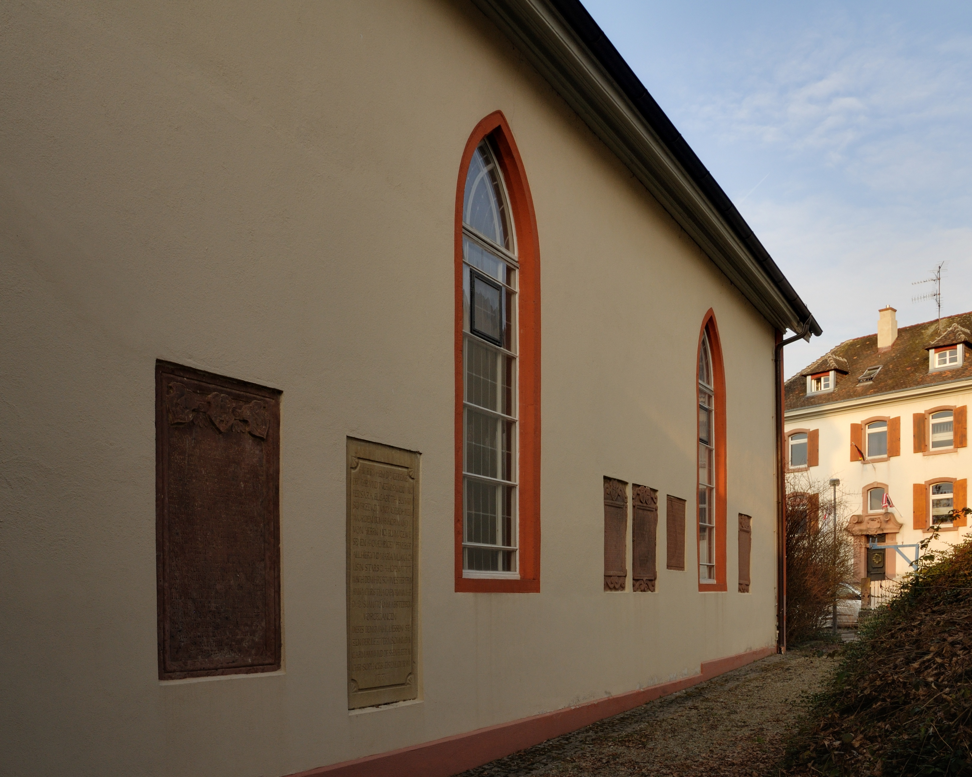 Holzen: Kirche